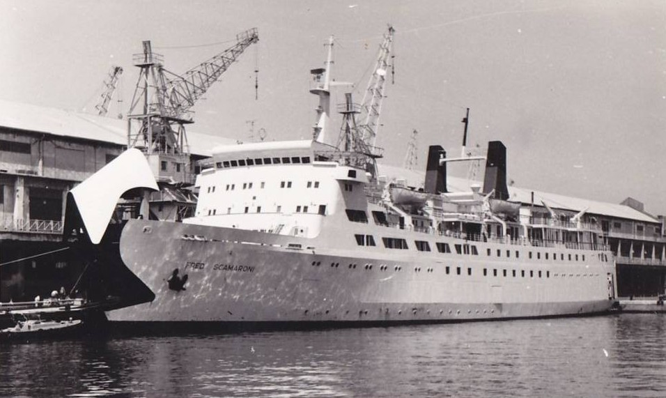 Le Fred Scamaroni de la Compagnie générale transatlantique à Marseille